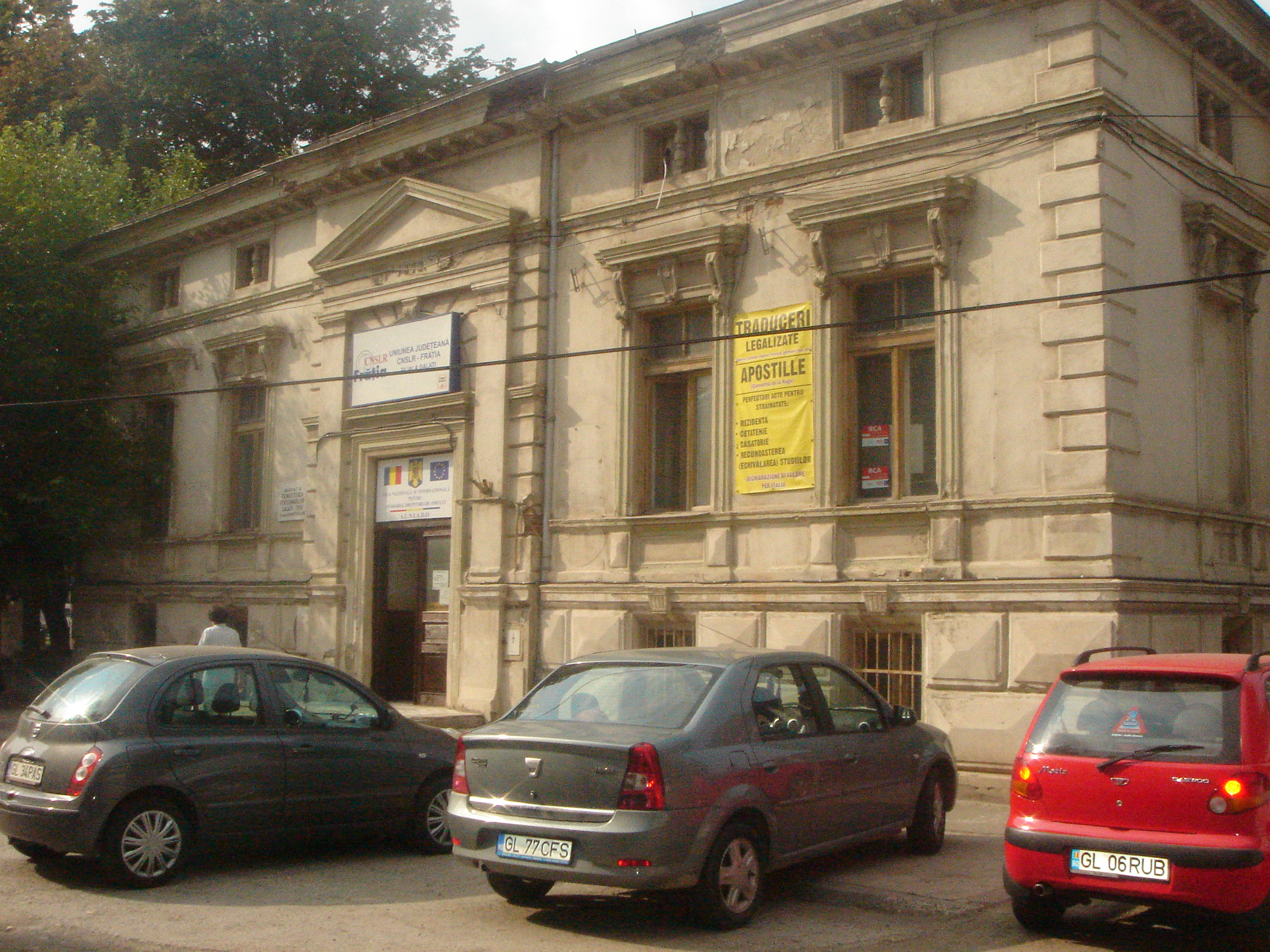 Azi serveste ca sediul Aliantei Pensionarilor.